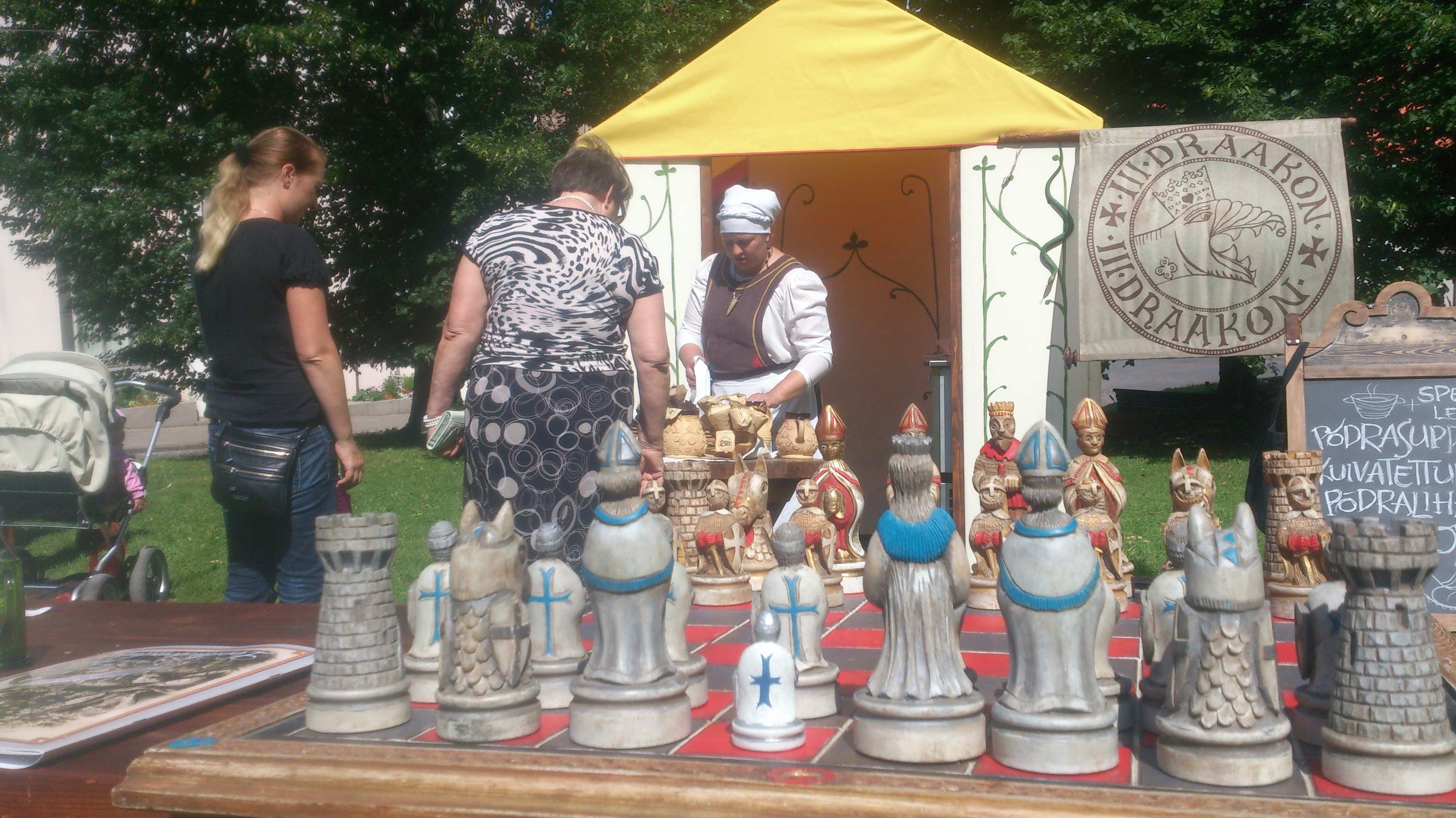 Olde Hansa Tartu hansalaadal 2014